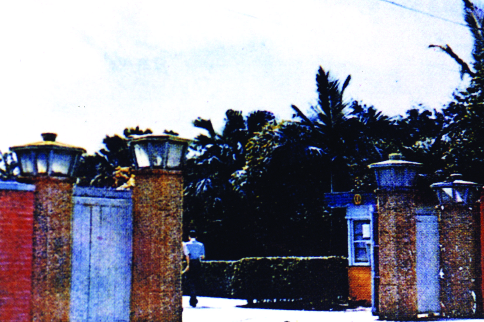 中文（台灣）: 省立法商學院時期老照片